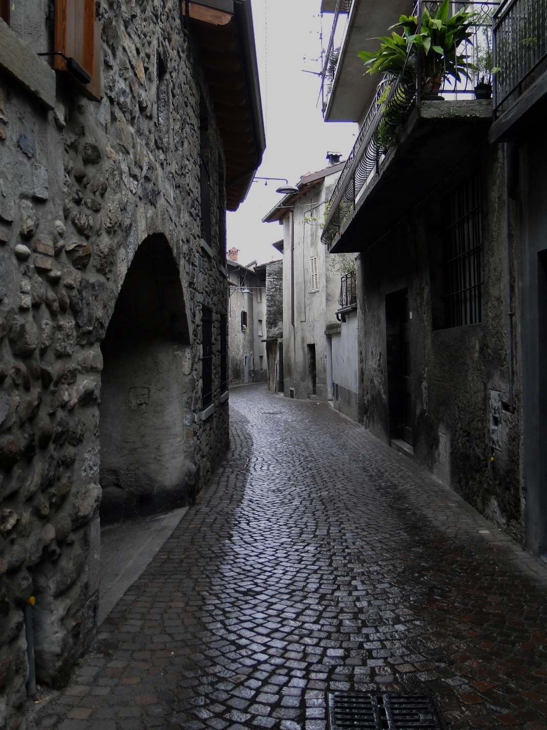 Centro storico. Vertova (BG). Italia